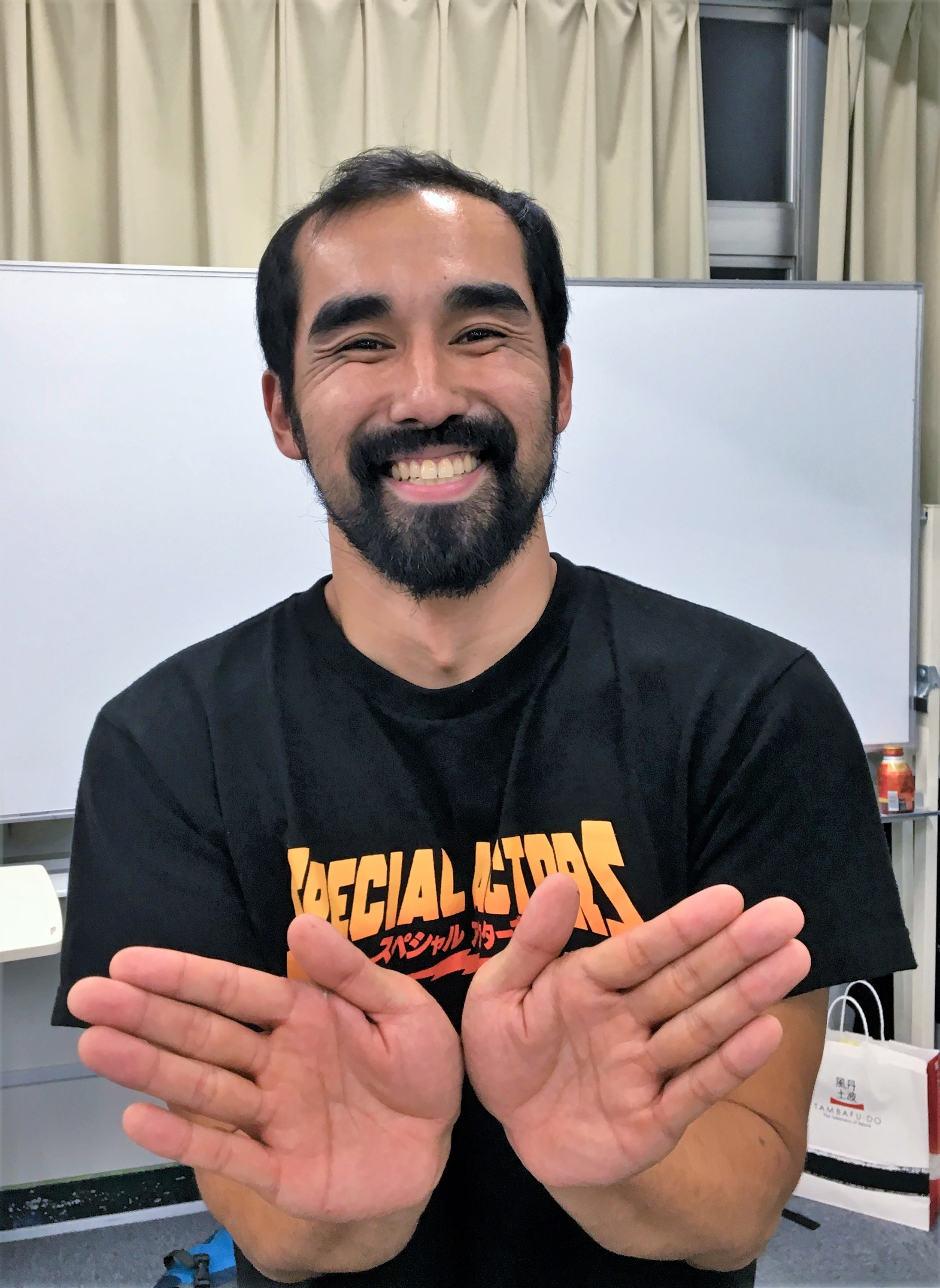 「スペシャルアクターズ ネタバレ全開トークショー」（東京学院ビル3F）に参加した廣瀬役の俳優・広瀬圭祐